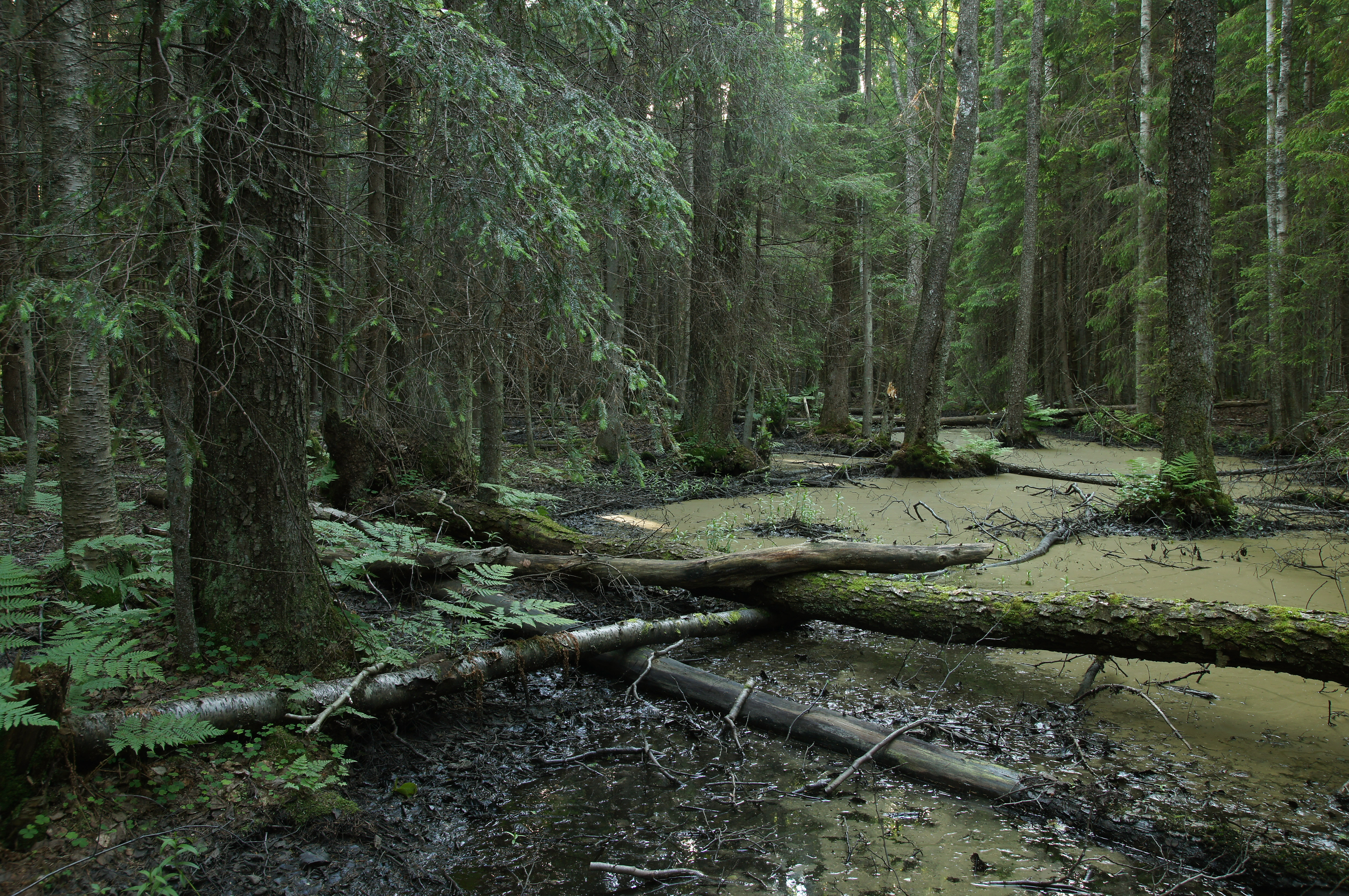 Pildistatud suvel metsa, Tahkuna looduskaitsealal, Hiiumaal.